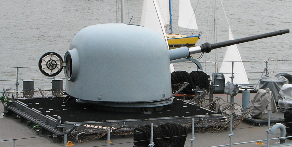 Beschreibung: Fregatte Mecklenburg-Vorpommern / F218 / Klasse F123 76 mm Schiffsgeschütz Fotograf: Darkone, 13. August 2005